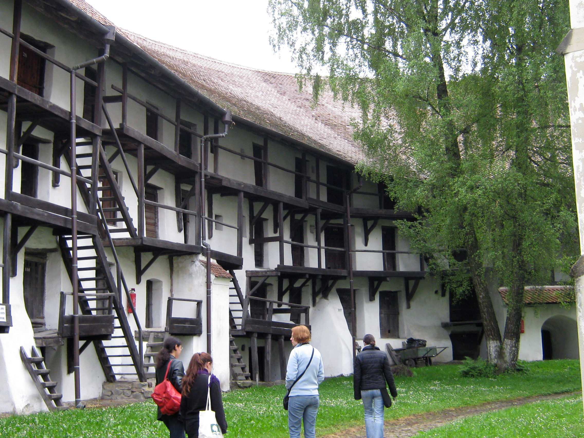 În poză se poate observa înălțimea deosebită a zidului care împrejmuiește biserica fortificată precum și schelăria complicată din lemn pe care se ajunge la gurile de tageri. 02